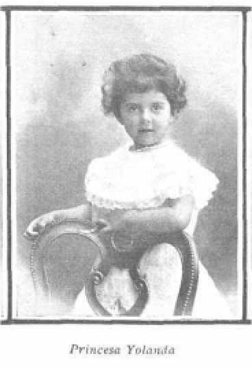 Yolanda di Savoia (1901 – 1986)